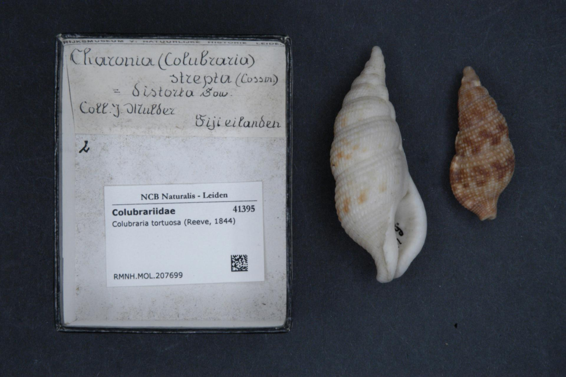 Colubraria tortuosa (Reeve, 1844)